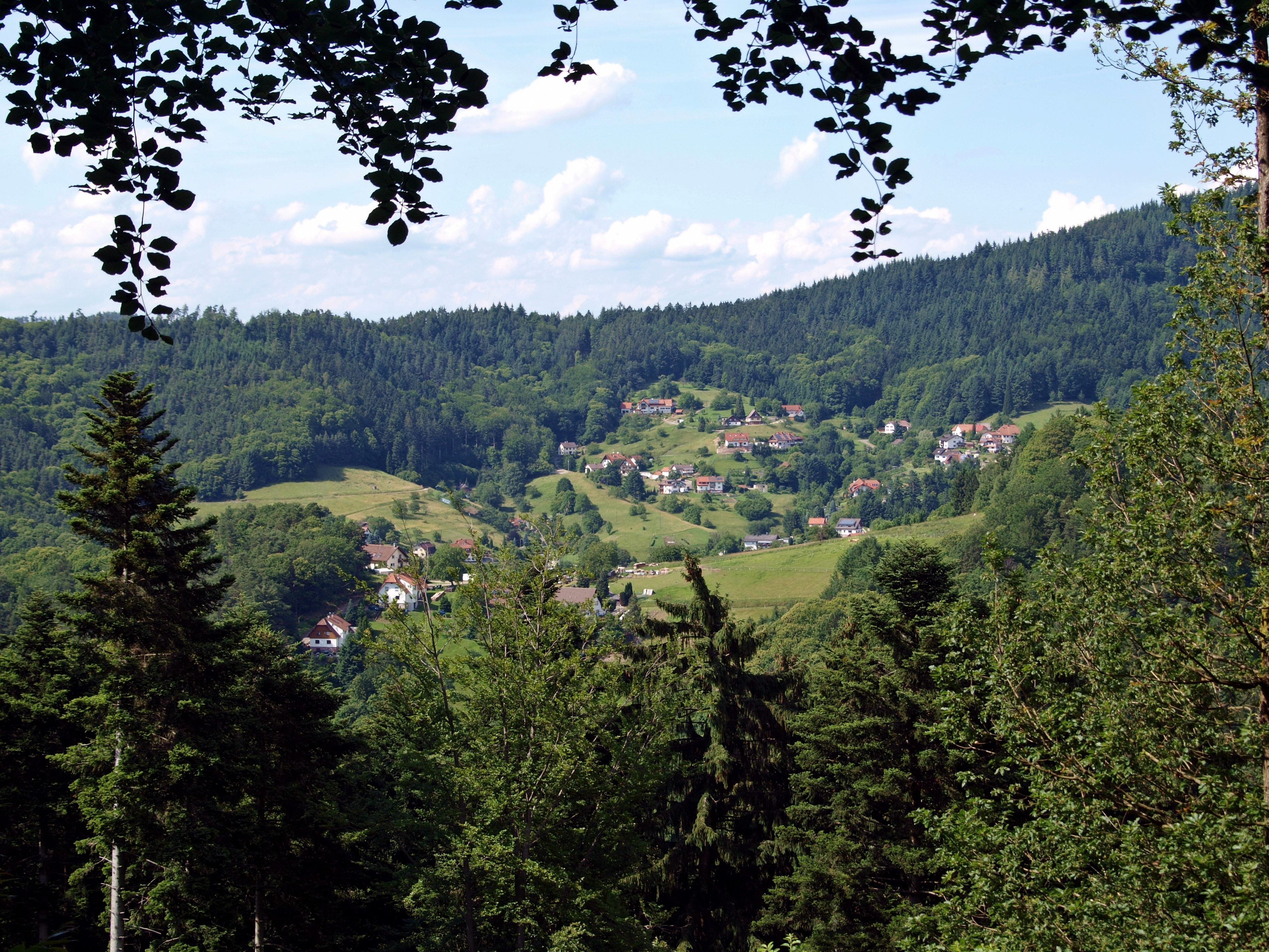 Bühlertal, Schwarzwald, black forest, forêt noire